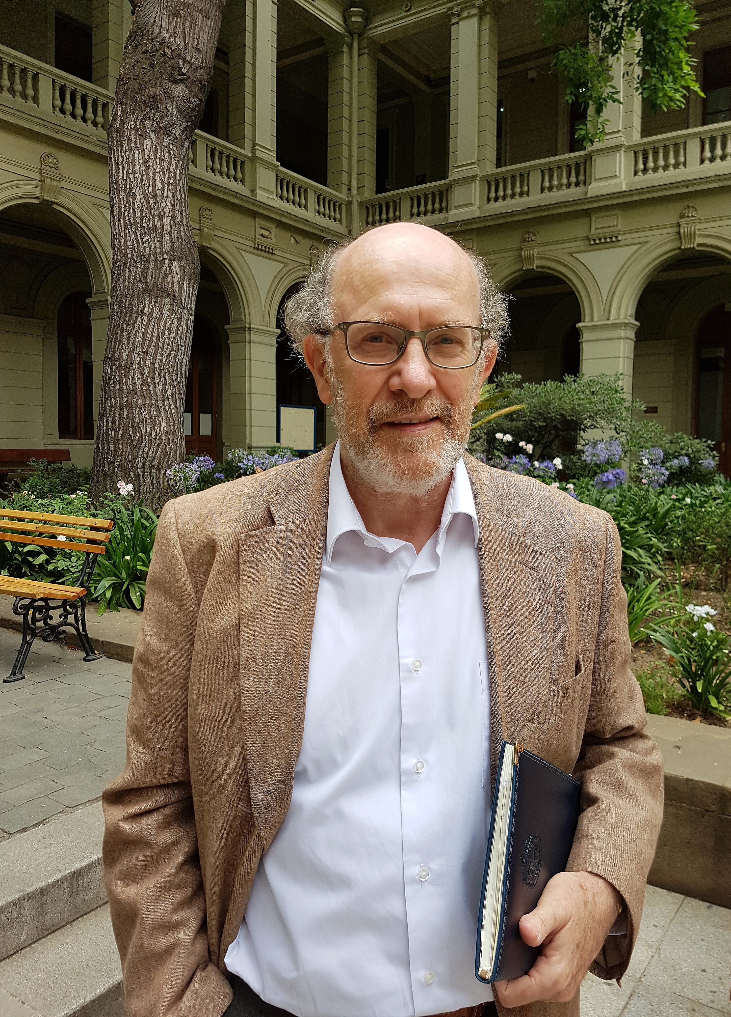 El periodista cultural y escritor chileno Miguel Laborde, en la casa central de la Universidad Católica (patio de la Virgen) donde se encuentran las oficinas de la Revista Universitaria que dirige.